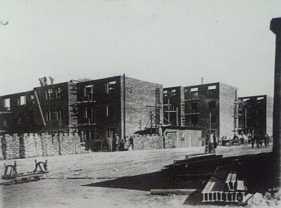 Osiedle im. Montwiłła - Mireckiego w Łodzi w okresie budowy; lata 20. XX w.